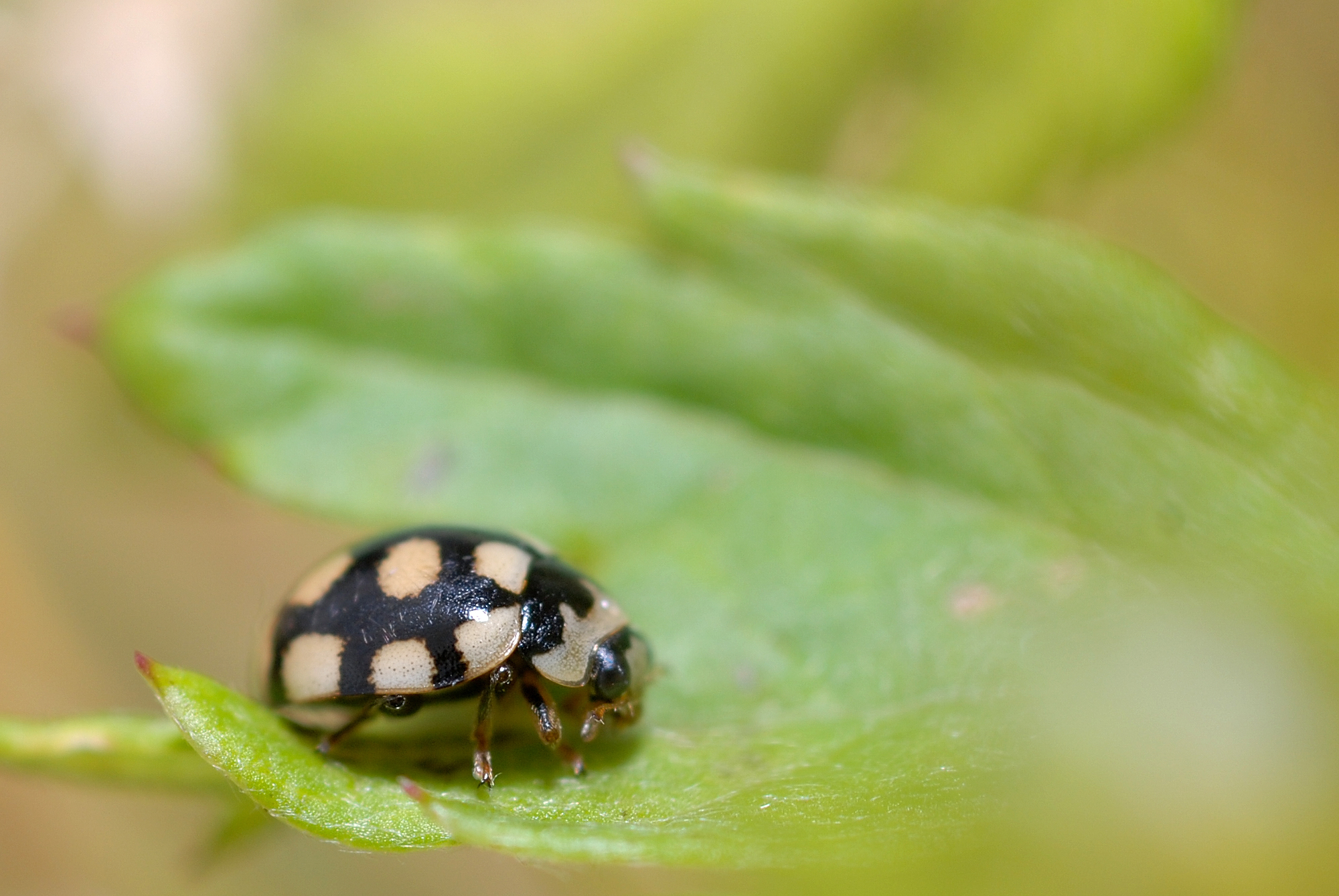 Coccinula quatuordecimpustulata